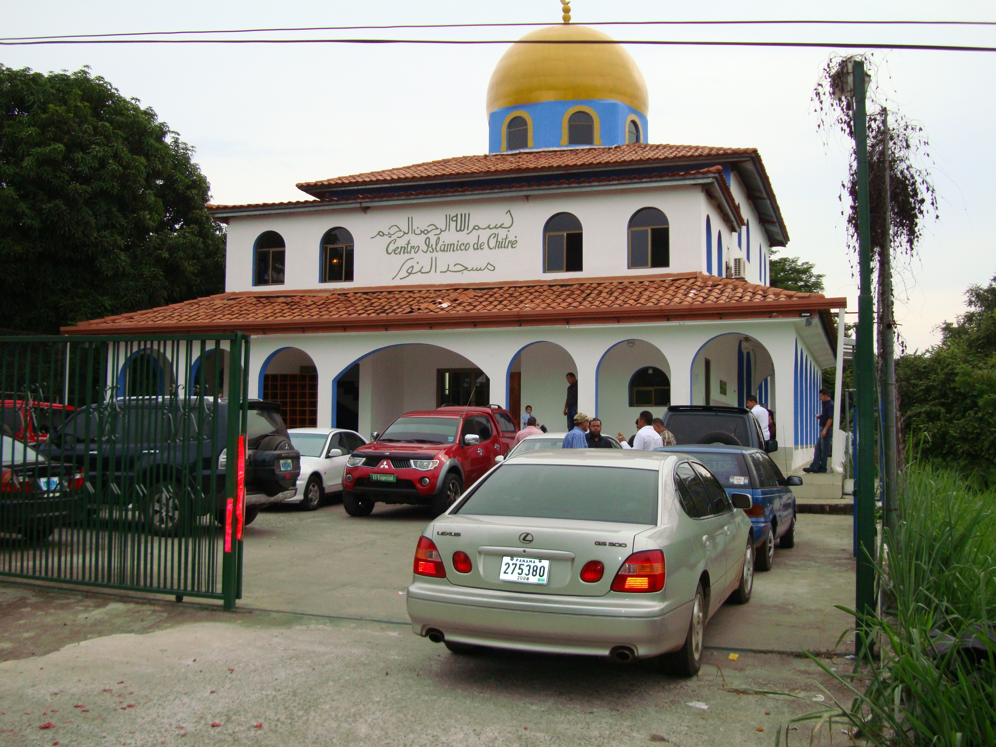 mezquita de chitre,panama